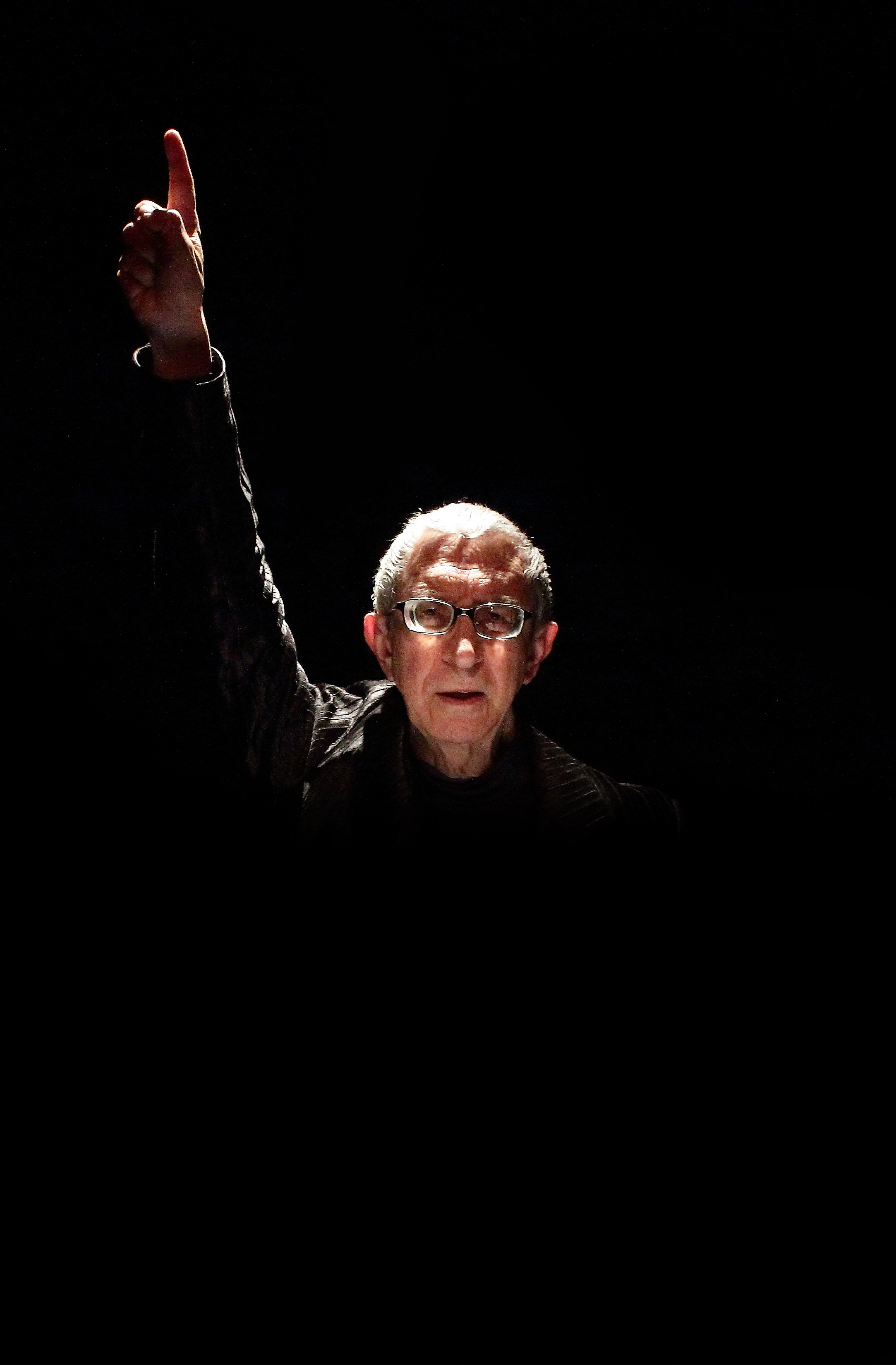 Pippo Di Marca, Essere e non essere, 2012